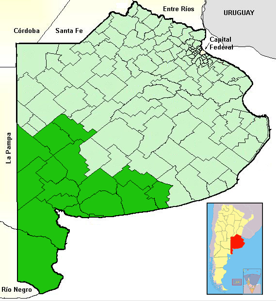 Mappa dell'Arcidiocesi cattolica di Bahía Blanca, nella provincia di Buenos Aires (Argentina)